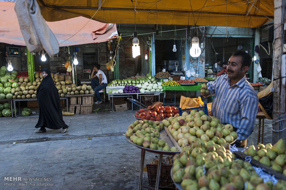 بازار نعلبندان گرگان